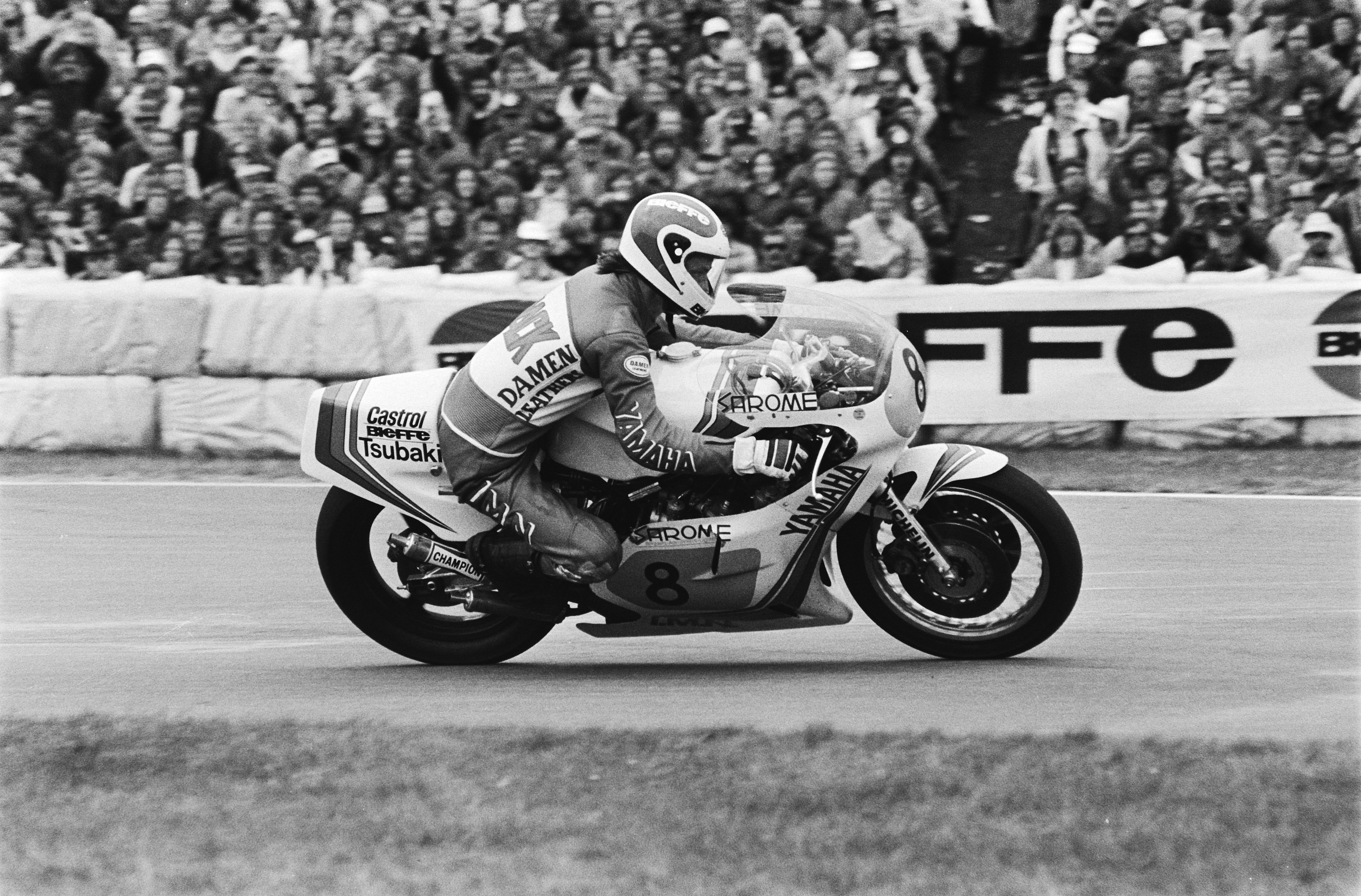 Collectie / Archief : Fotocollectie Anefo Reportage / Serie : TT Assen 1980 Beschrijving : TT Assen ; Jack Middelburg (winnaar 500cc) in aktie Datum : 28 juni 1980 Locatie : Assen Trefwoorden : motorcoureurs, motorfietsen, motorraces, motorsport, sport Persoonsnaam : Middelburg, Jack Fotograaf : Pereira, Fernando / Anefo Auteursrechthebbende : Nationaal Archief Materiaalsoort : Negatief (zwart/wit) Nummer archiefinventaris : bekijk toegang 2.24.01.05 Bestanddeelnummer : 930-9036